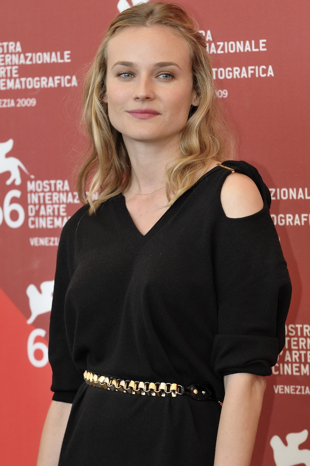 66ème Festival du Cinéma de Venise (Mostra), 10ème jour (11/09/2009) Photocall avec Jared Leto, Diane Kruger, Sarah Polley et le réalisateur Jaco Van Dormel pour le film : MR. NOBODY